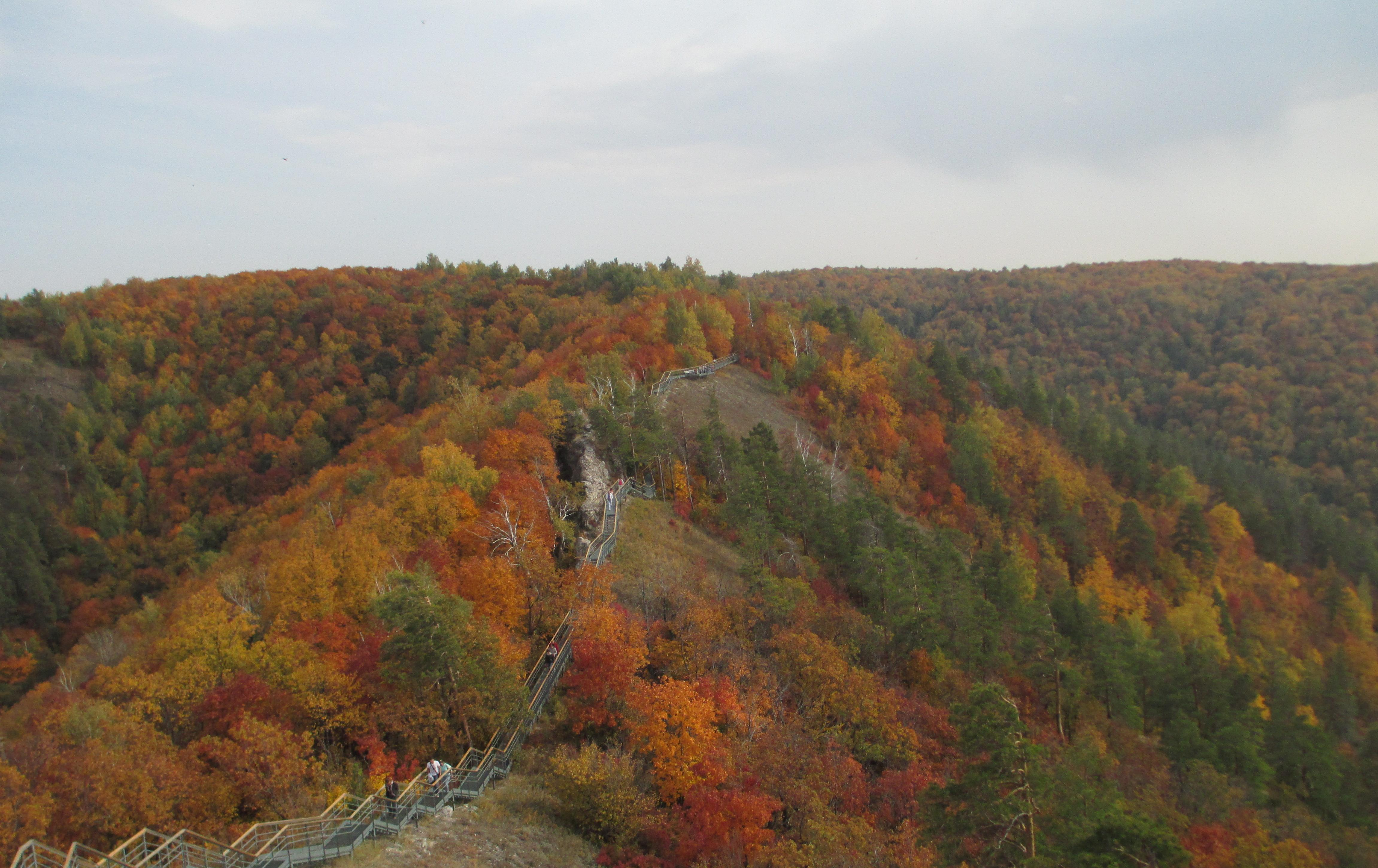 Самарская Лука, гора Стрельная This image is related to the protected area of Russia number 6300010